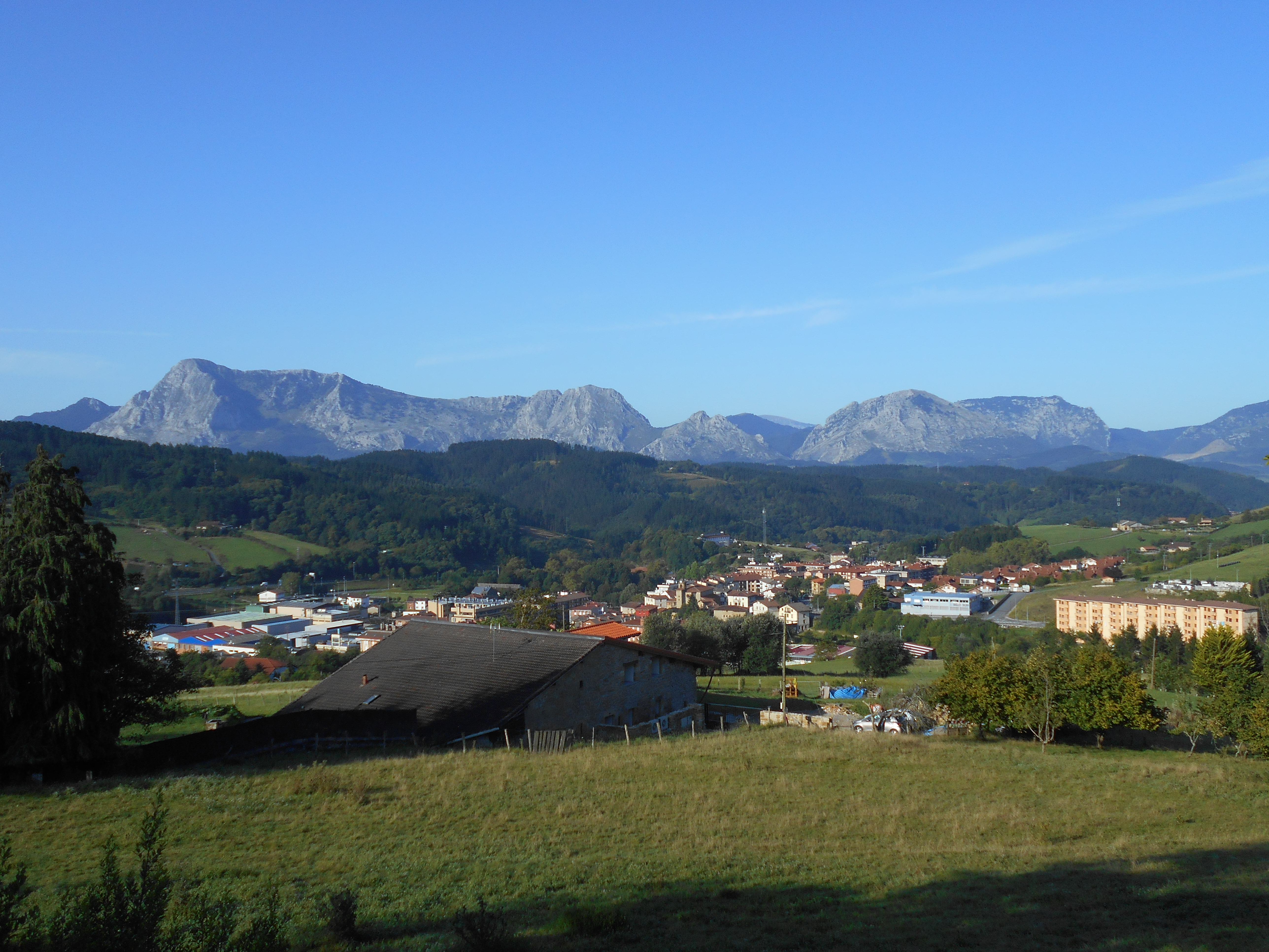 Vista de Zaldibar desde el ascenso a Areitio